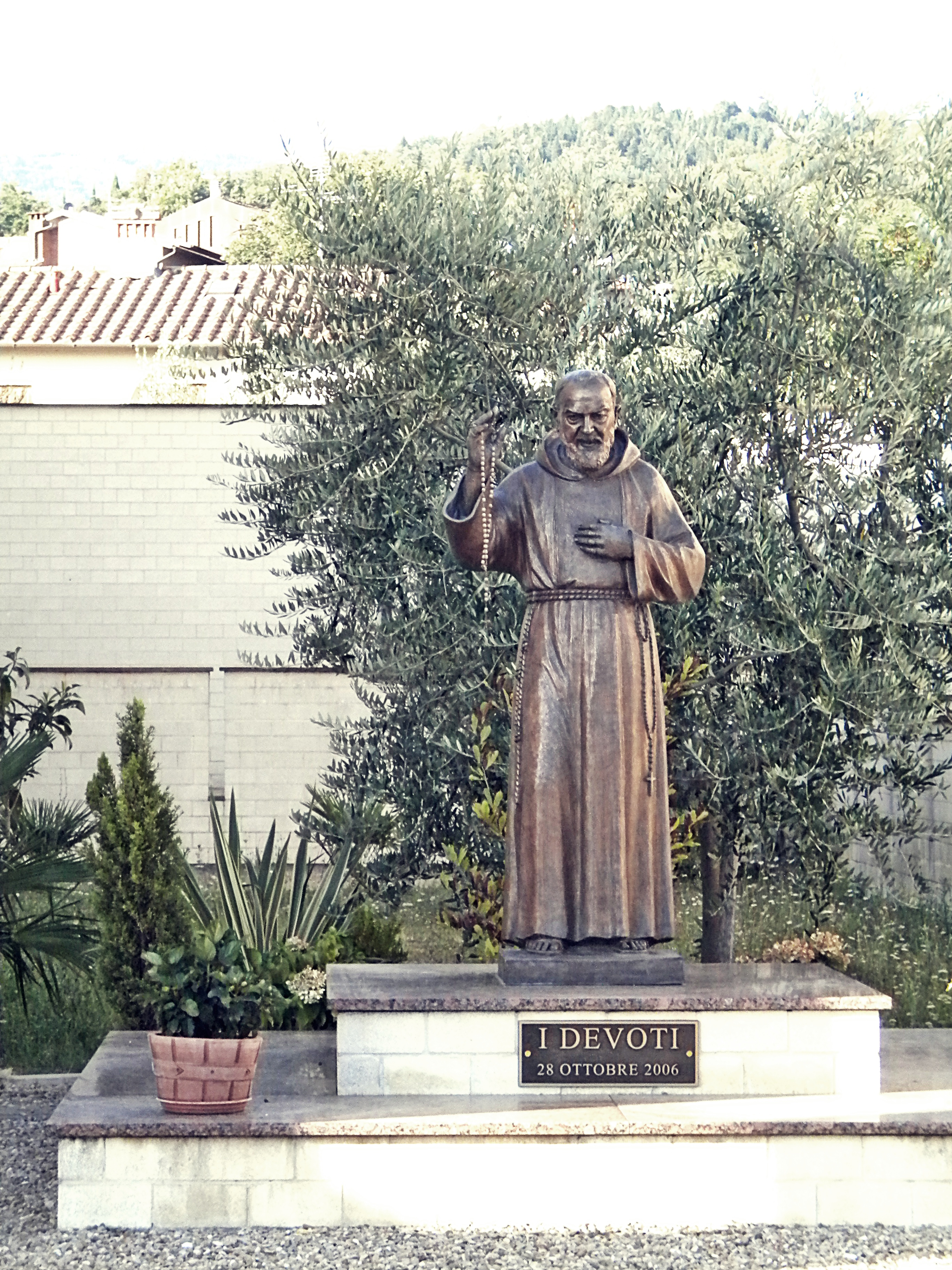 padre pio